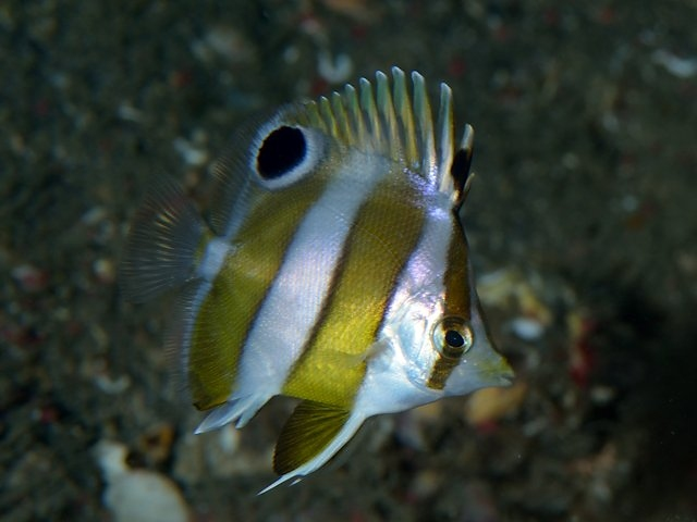 ゲンロクダイ Roa modesta